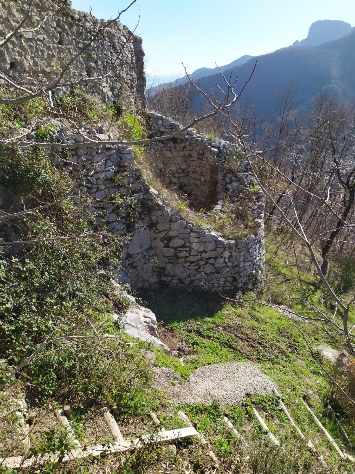 Resti di una delle 16 torri del castello di Santa Maria la Nova di Tramonti(sa)